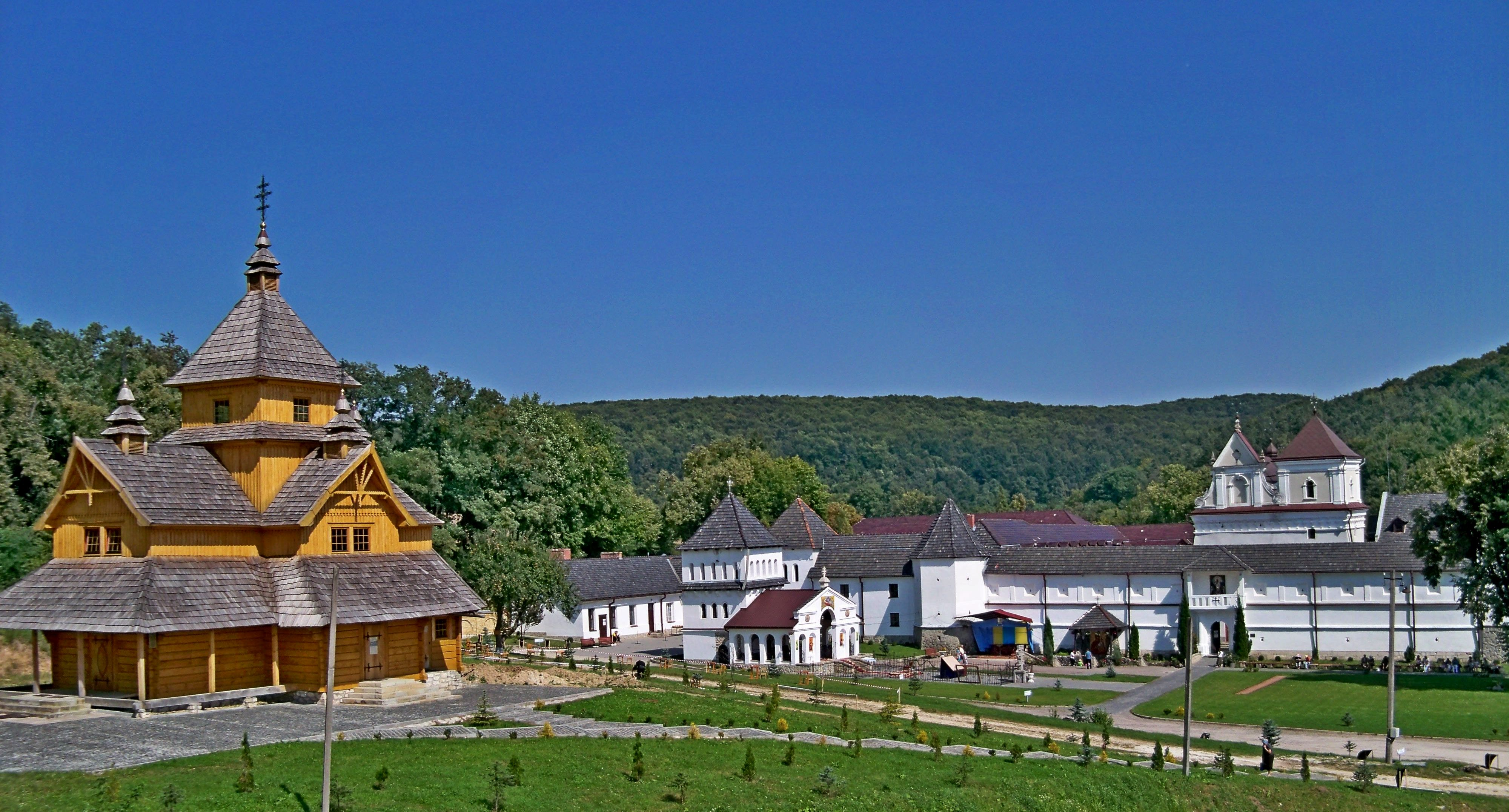 Унівський монастир-фортеця (мур.), с.Унів (Міжгір'я)